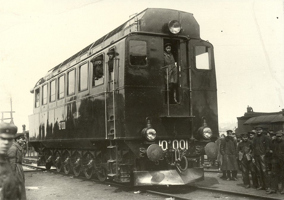 Опытный тепловоз Юэ-001 (позже переименован в ЭЭЛ2) в Киеве